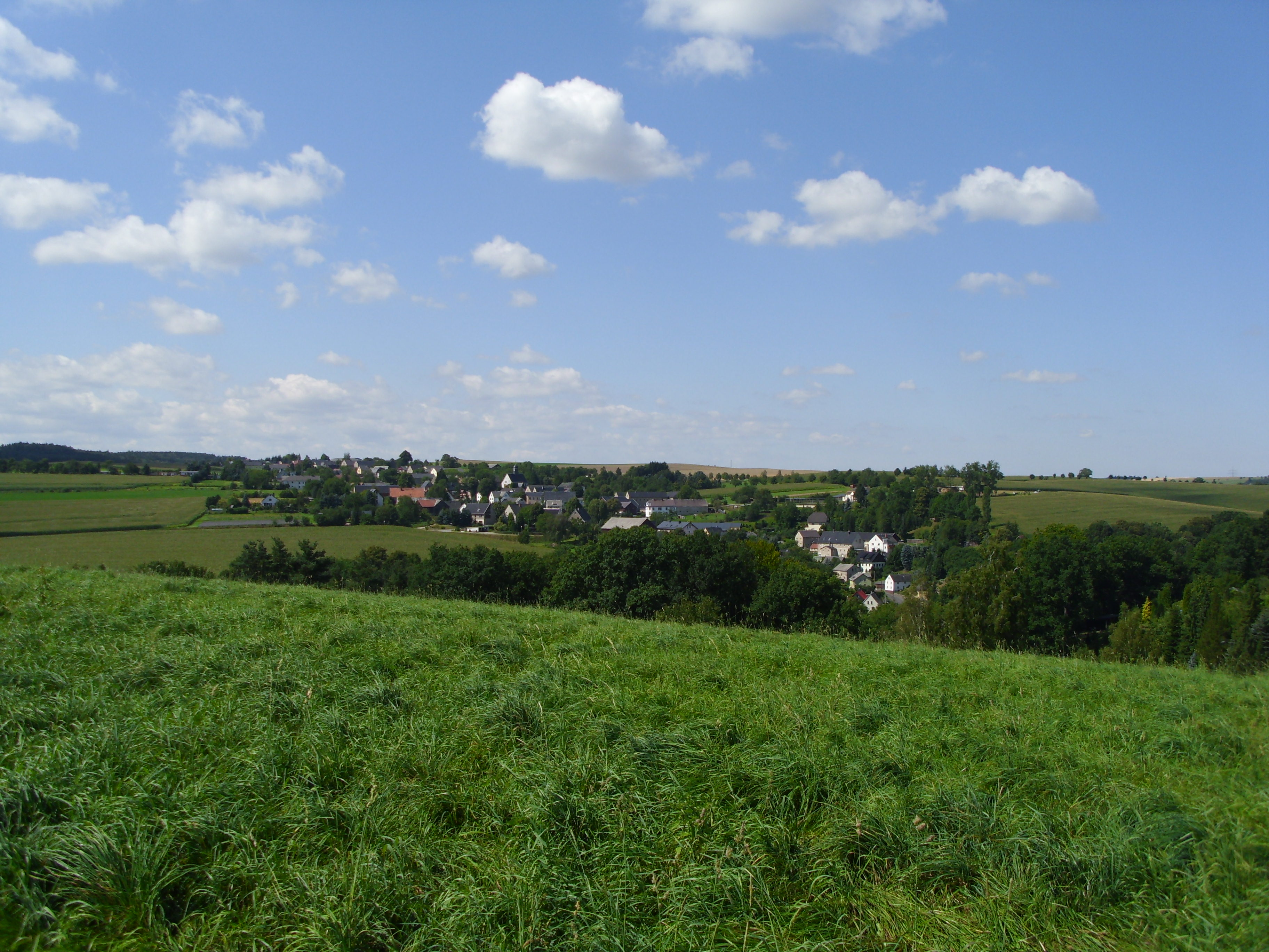 Blick auf den alten Dorfkern von Seifersdorf.